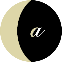 Mnemonik der abnehmenden Mondphase (abnehmend nach dem Vollmond)